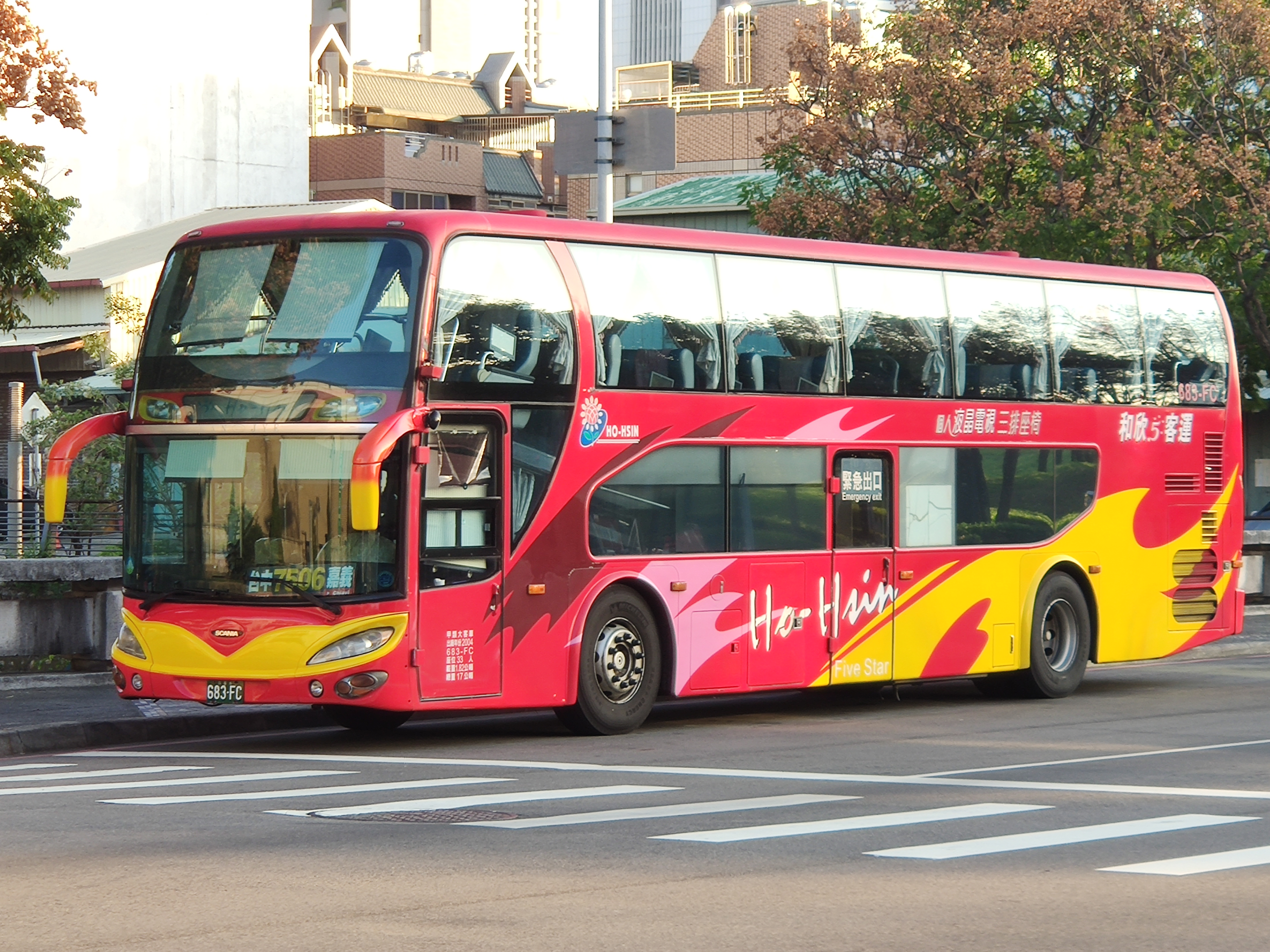 和欣客運 SCANIA K114大客車 683-FC